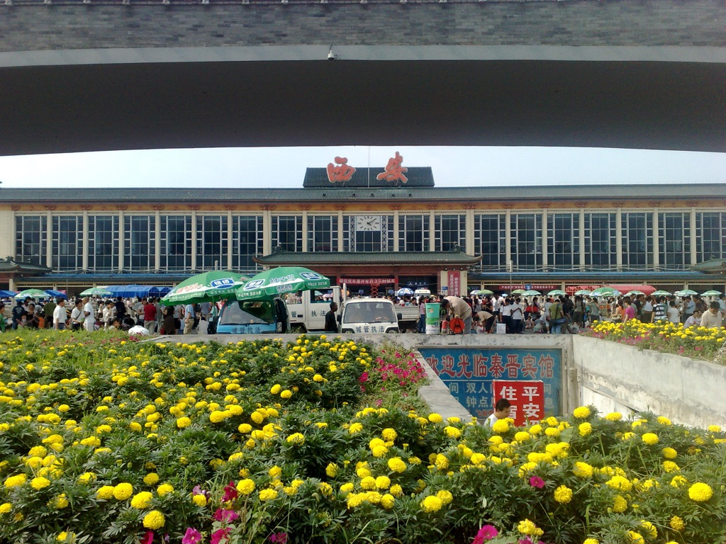 西安站